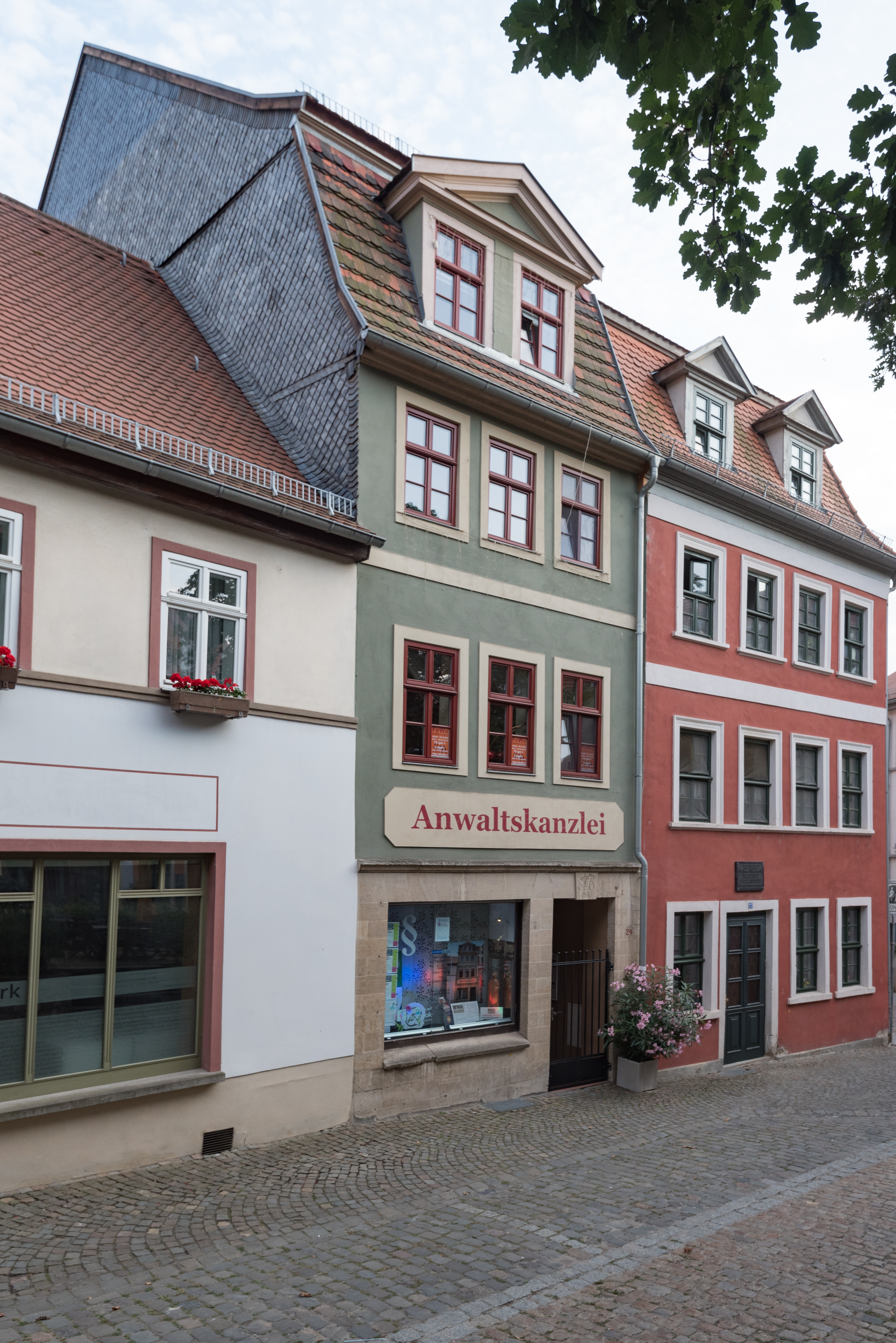 Naumburg (Saale), Steinweg 24